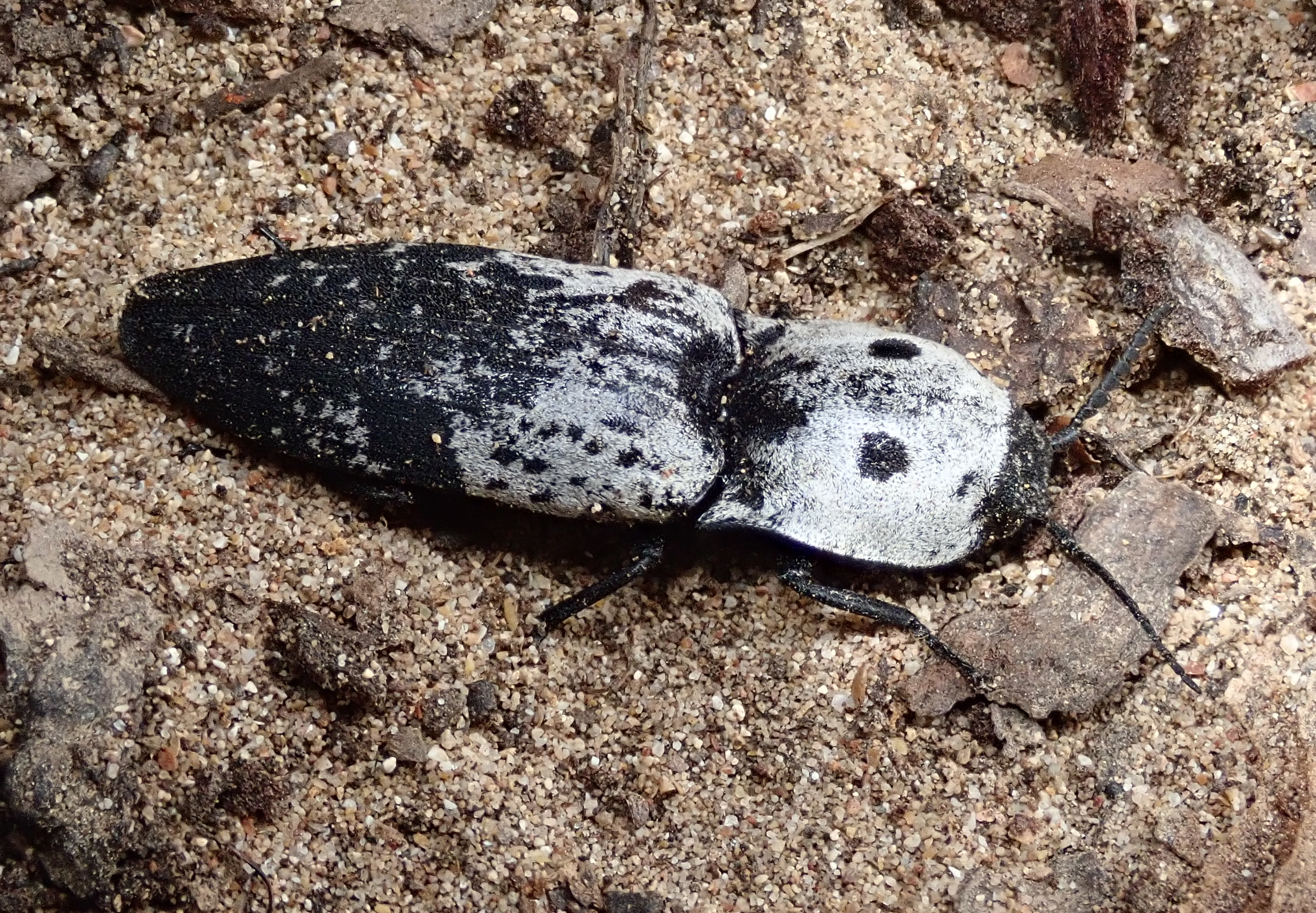 αρκετά σπάνιο κολεόπτερο Calais parreysii μήκος 30 με 40 χιλιοστόμετρων από το πευκοδάσος Καλογριά This is a photography of Natura 2000 protected area with ID GR2320001